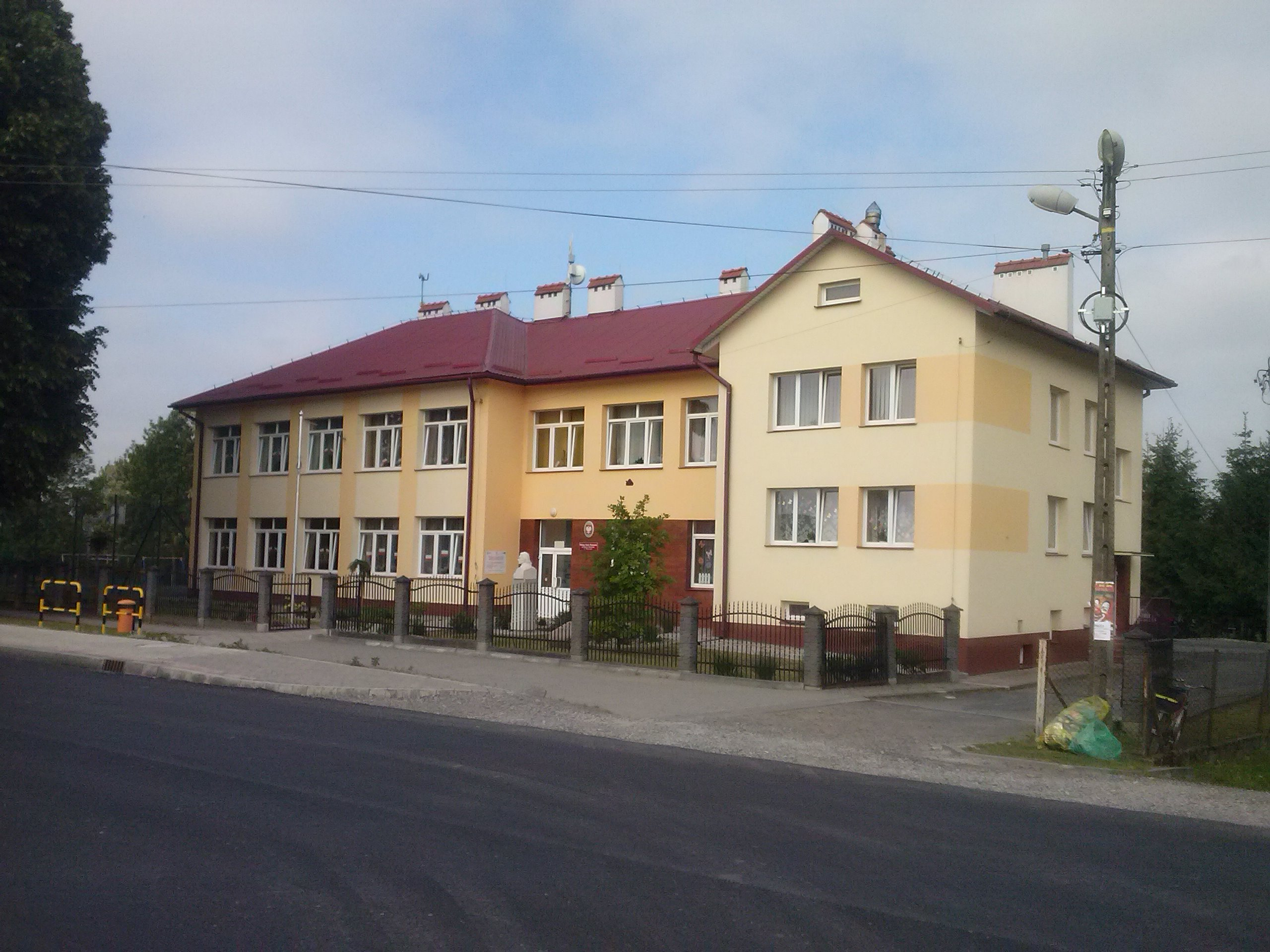 Szkoła podstawowa w Ubieszynie